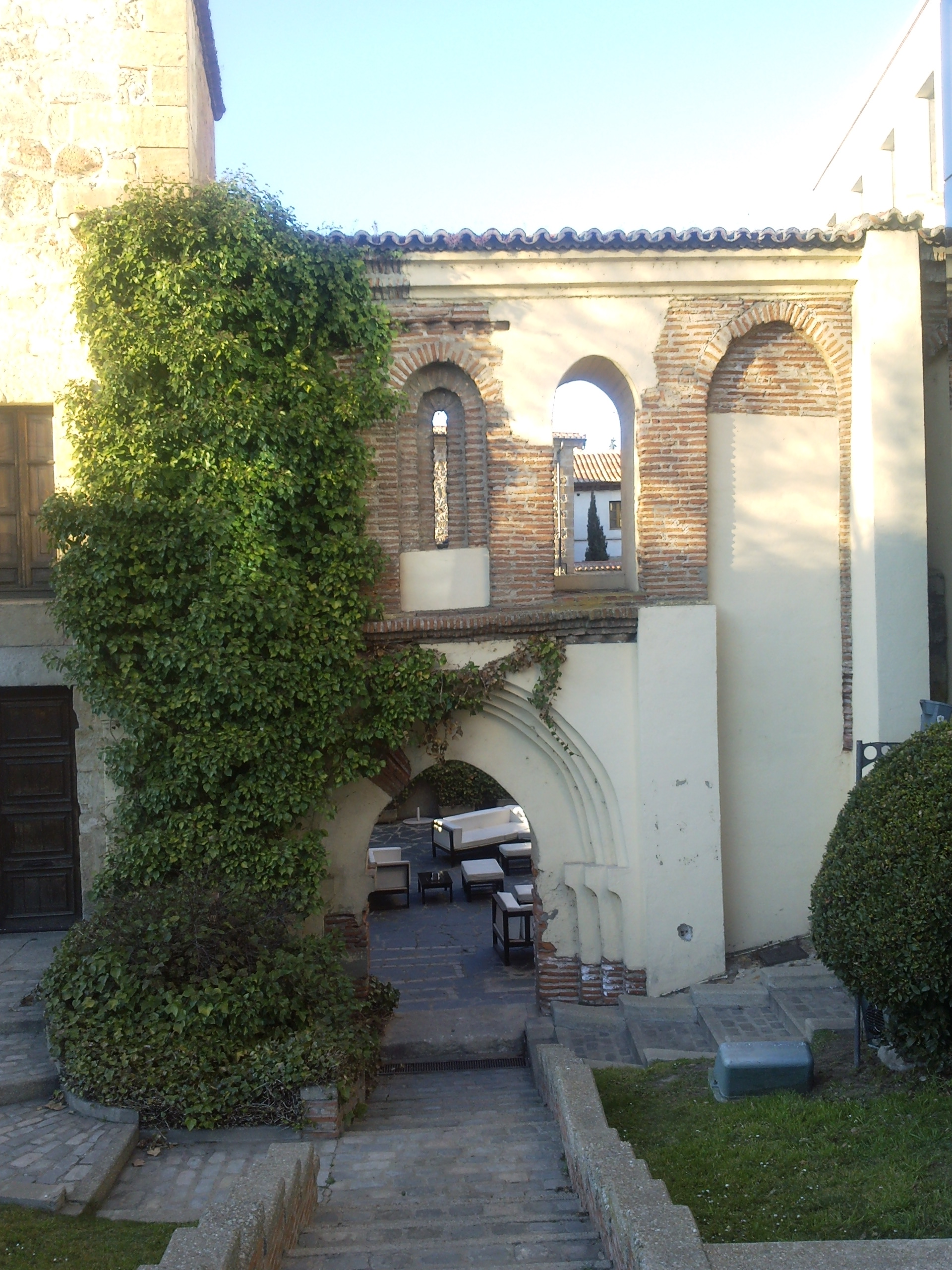 Vista de las ruinas de la iglesia de San Polo.